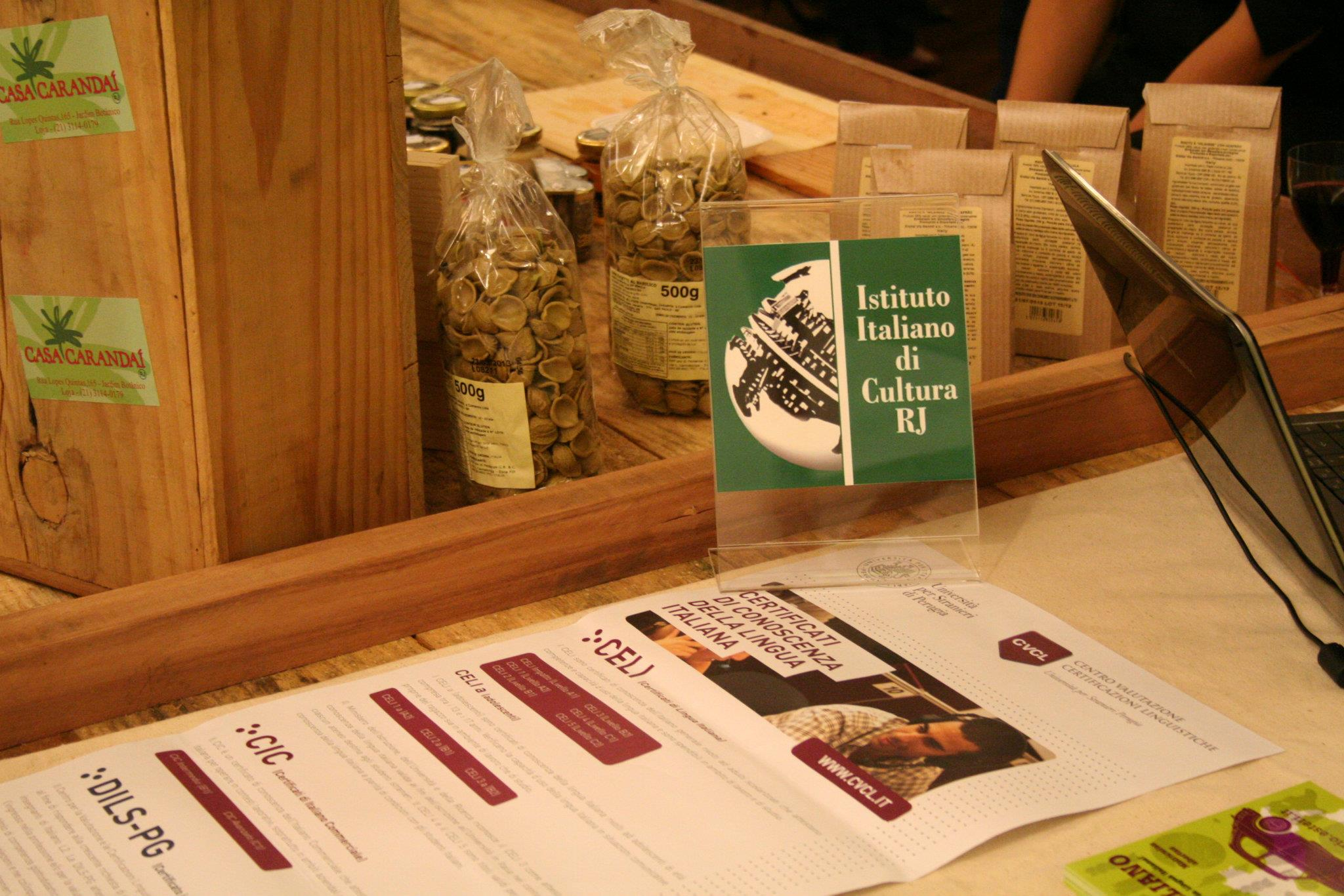 foto realizada no feira de produtos e alimentos originários da Itália vendidos no Brasil